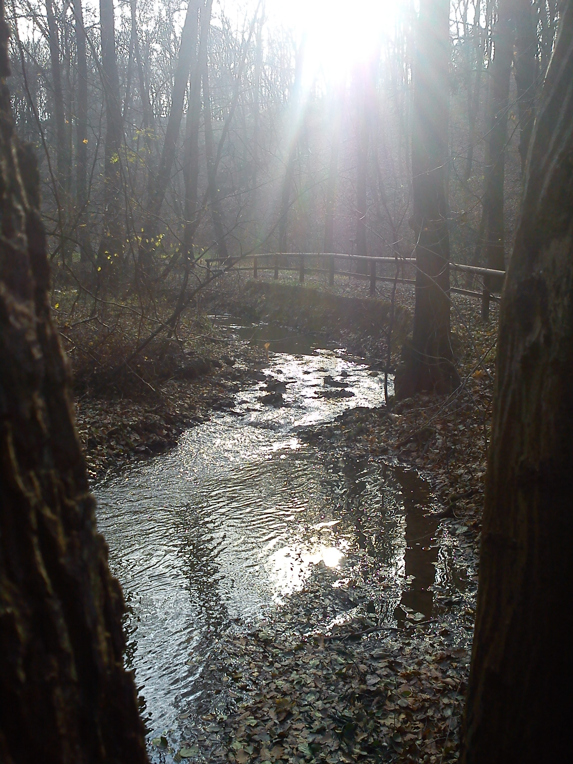 Kunratický potok - podzim